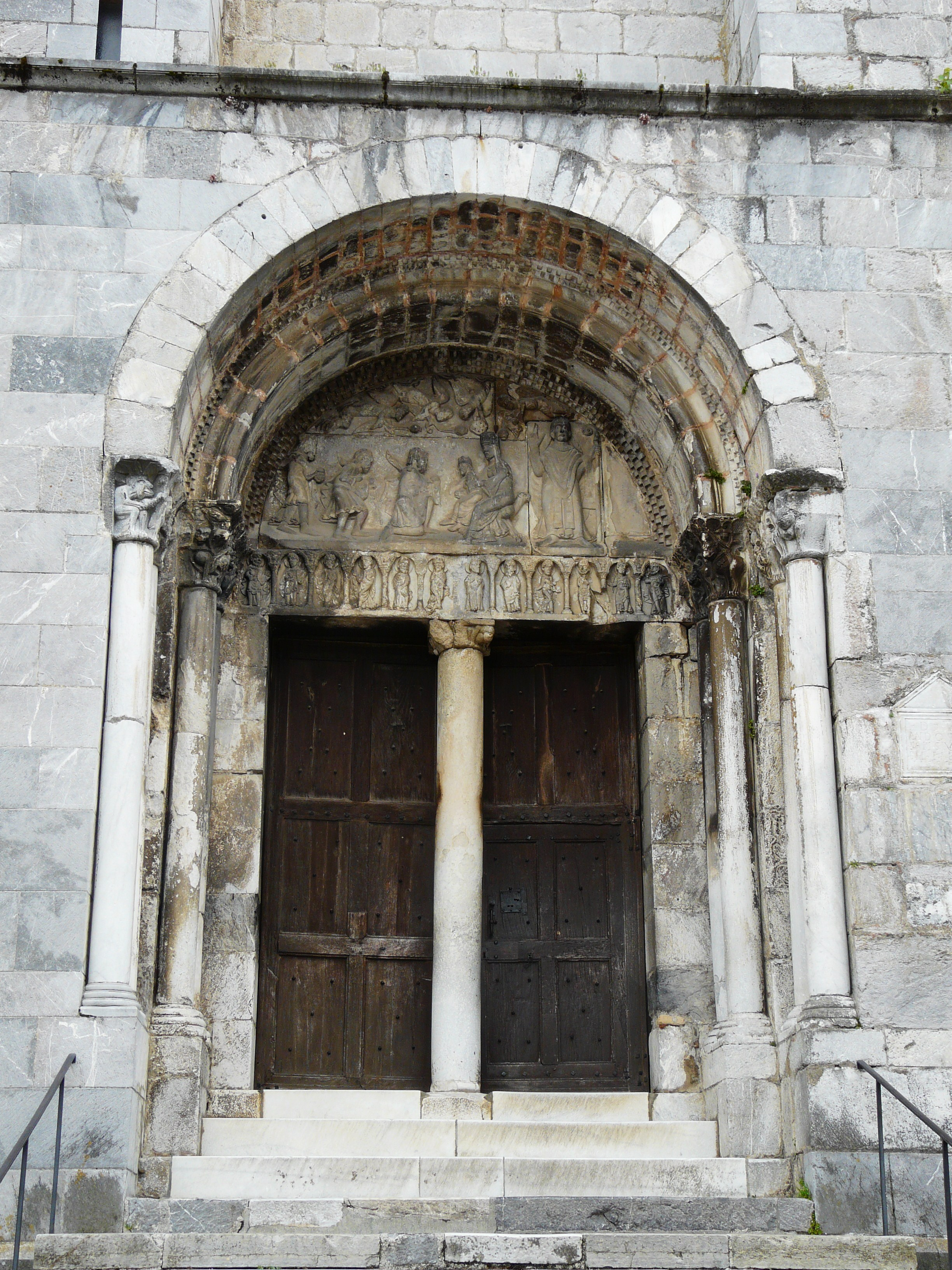 Le portail de la cathédrale Notre-Dame, Saint-Bertrand-de-Comminges, Haute-Garonne, France.